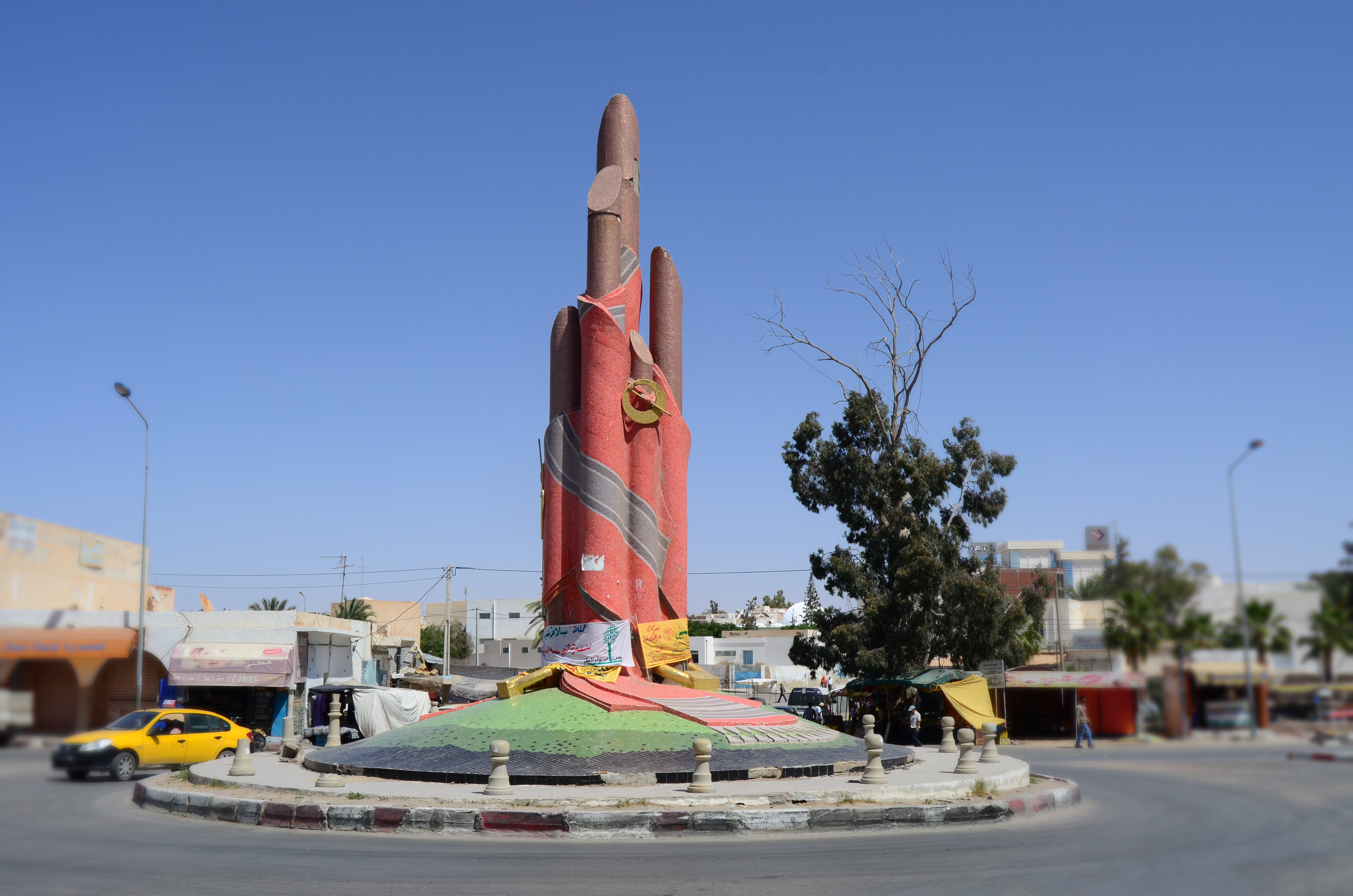 Centre ville de Medenine avec le monument centrale de EL-Khlel